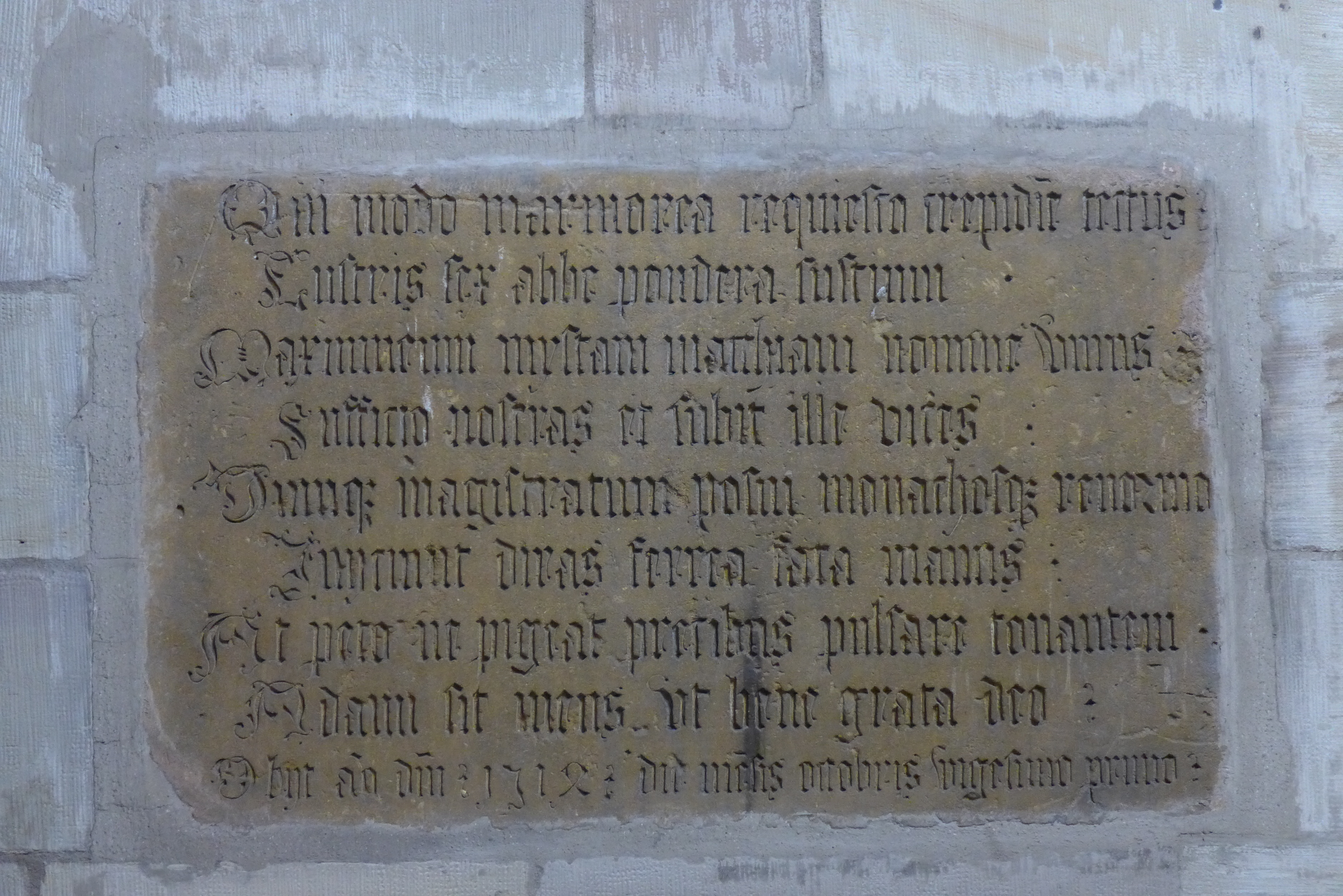 Ehemalige Abteikirche St. Nabor (St. Avold), Inschrift